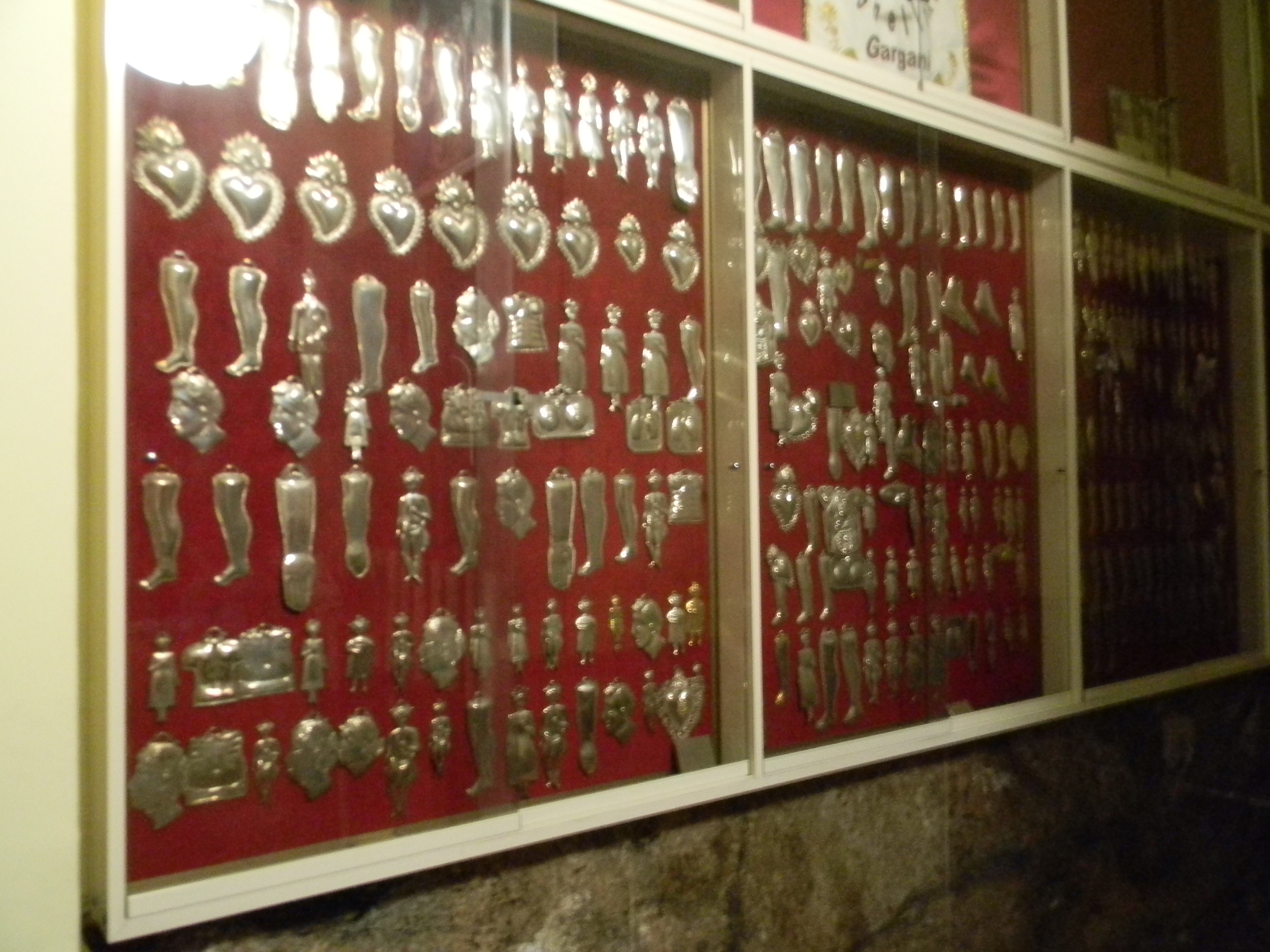 Doni per grazia ricevuta, Santuario di Sant'Agnello Abate